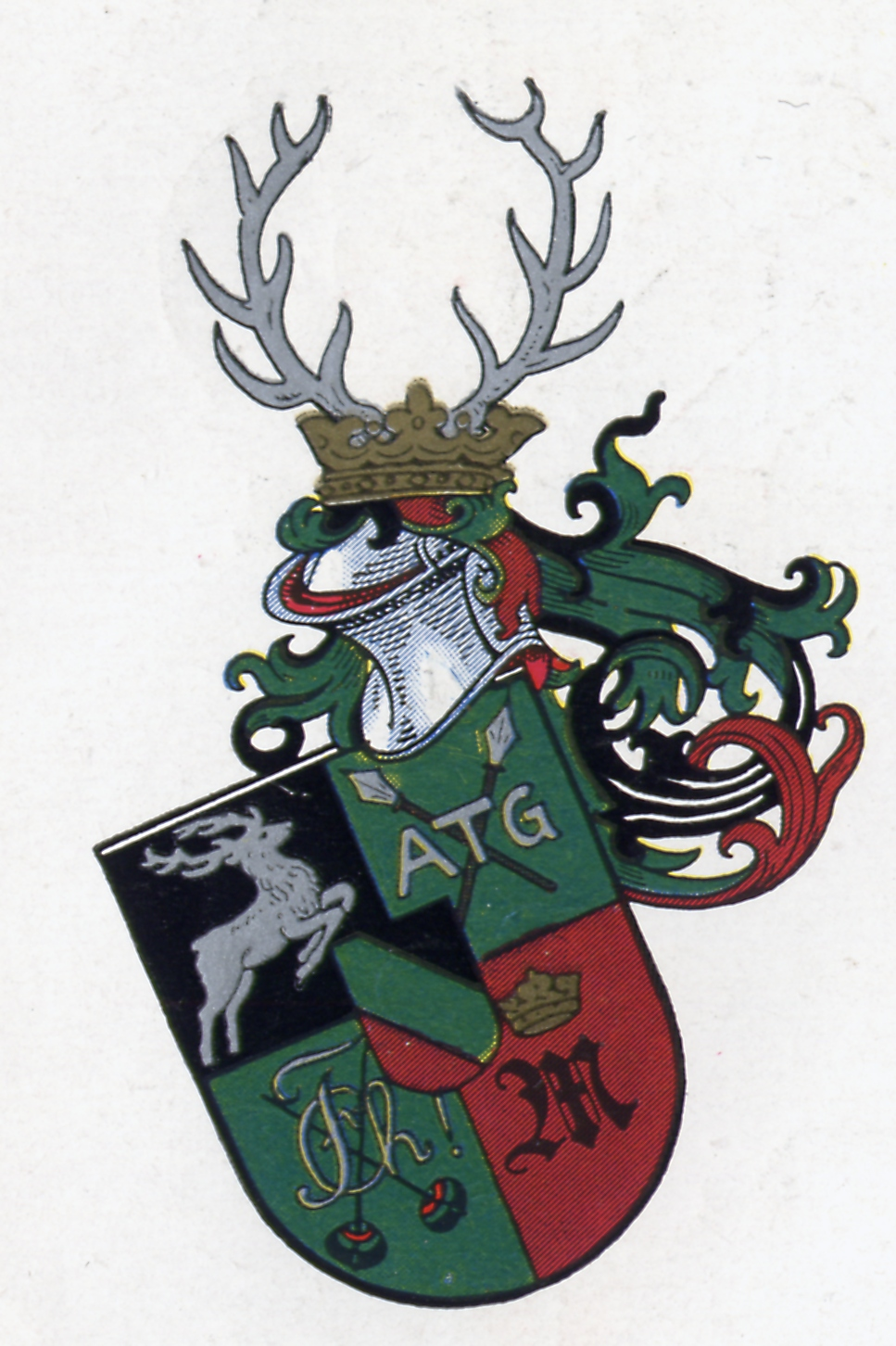 Wappen der Cheruscia zu Hann. Münden